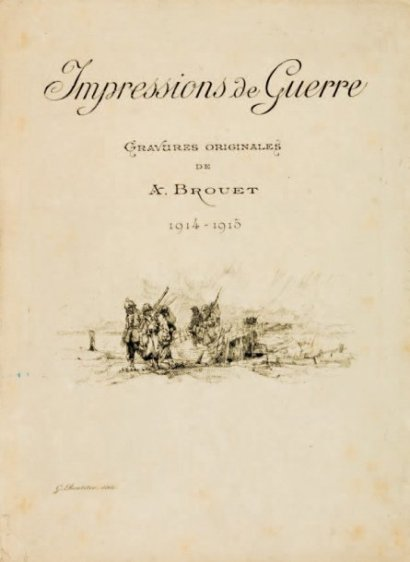 Impressions de Guerre.1914-1915 Album de 6 gravures originales tirées à l'eau-forte, présentées sous marielouise, dans un album à rabats au premier plat illustré. Chacune des planches, de format 20x12cm, est signée au crayon, en marge, par Auguste Brouet et titrée. Le tirage de l'album a été exécuté à 75 exemplaires par Gaston Boutitie, éditeur du Catalogue raisonné de l'artiste. Les gravures sont précédées d'un tirage sur papier pelure de la couverture, formant ainsi une page de titre. L'exemplaire est également augmenté d'une planche supplémentaire de Brouet, tirée aussi à 75 exemplaires et signées, mais d'un format 24x15cm, et tirée sur Japon.